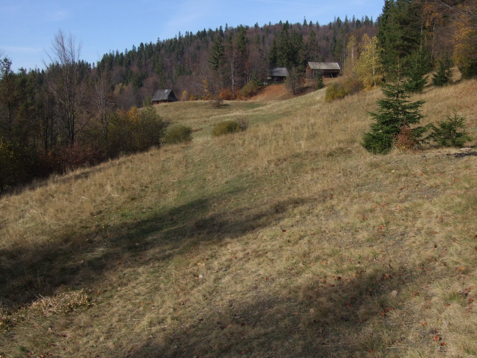 Polana Srokówki w Gorcach pod Wysznią